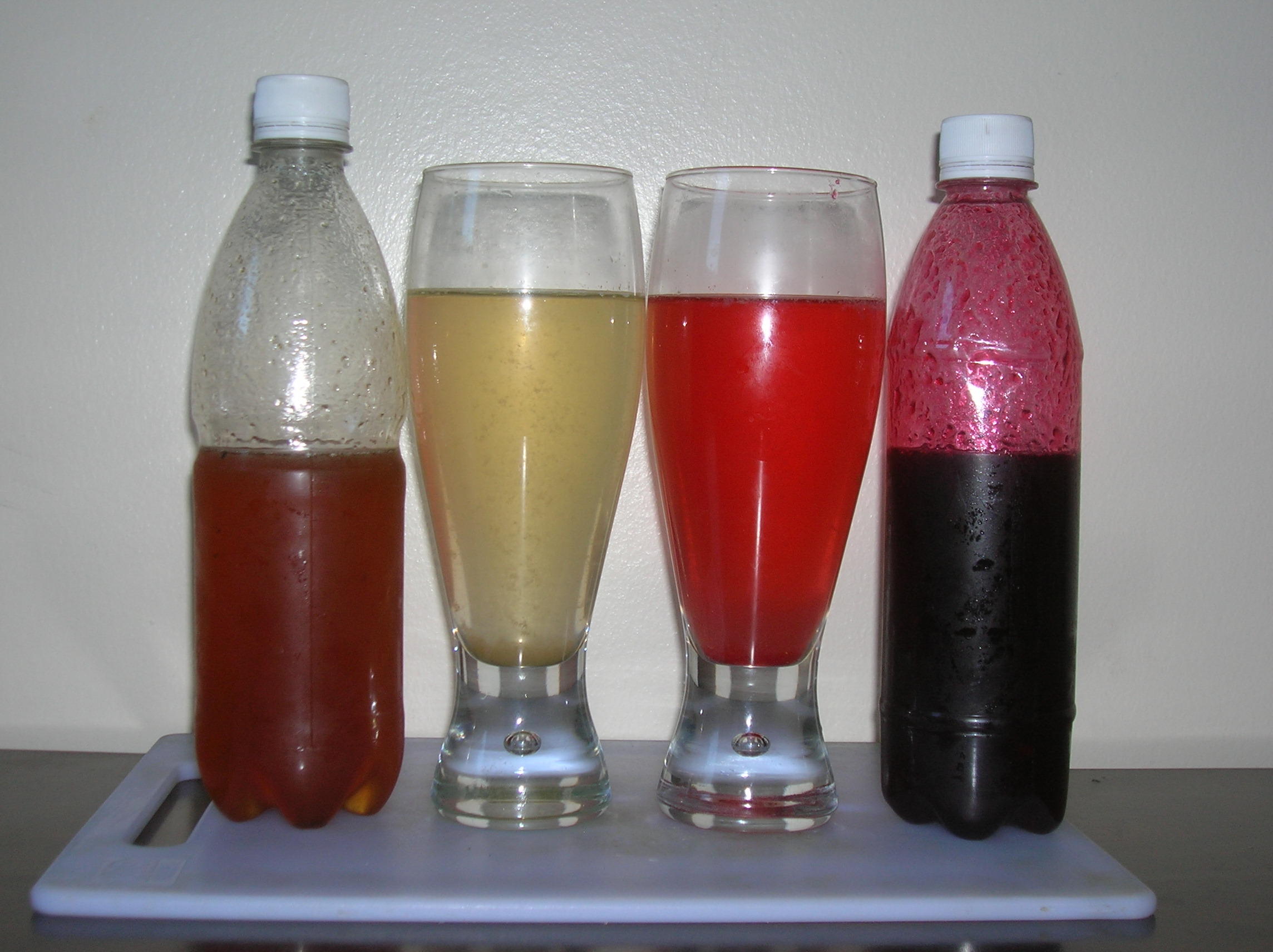 _indica Garcinia indica